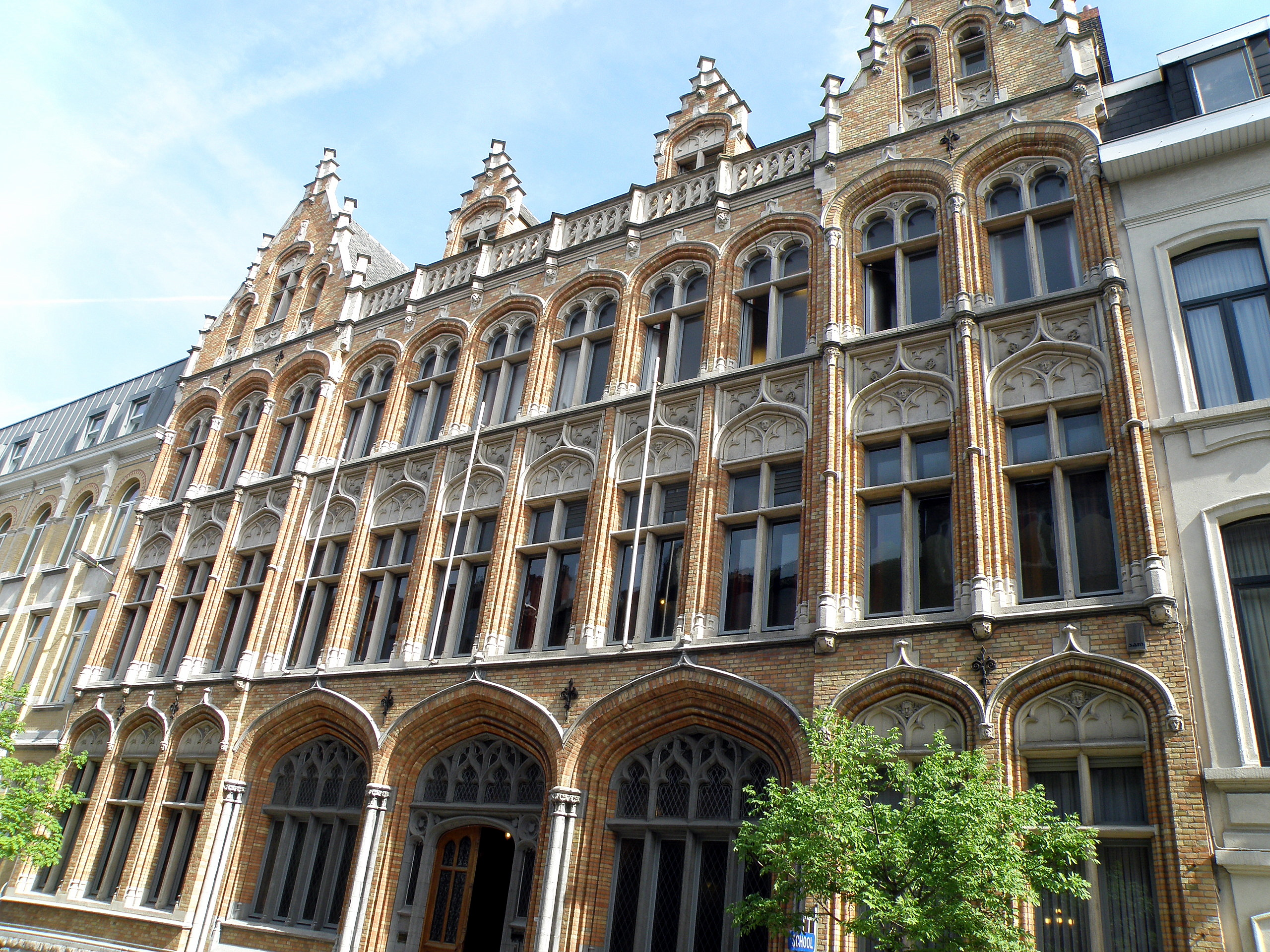 Antwerpen, België. Zog. Belpaire-Instituut (Katholieke Vlaamse Hogeschool voor Vrouwen), aan de Jozef De Bomstraat nr. 11, bouwjaar 1905-1906, n.o.v. arch. Jules Coomans. Vgl. Vlaams Instituut voor Bouwkundig Erfgoed.